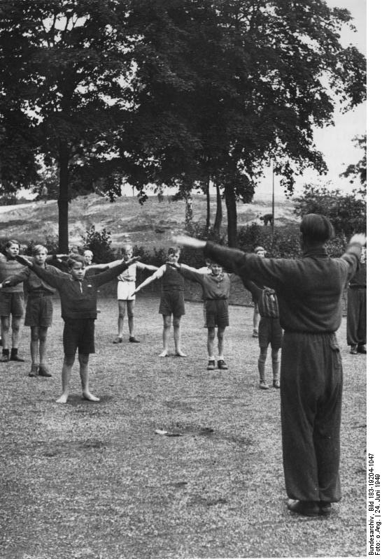 Berlin, Haus der Kinder, Gymnastikunterricht Illus/ Panorama-Foto Berlin Haus der Kinder in Berlin-Lichtenberg. Schon am zeitigen Vormittag finden sich viele Jungen und Mädchen im Haus der Kinder ein, um an den Kursen teilzunehmen. UBz: Jungen beim Gymnastikunterricht. (Wegen Überbesetzung der Elementarschulen wird teilweise Vor- oder Nachmittagsunterricht abgehalten, sodaß viele Kinder vormittags, wenn kein Schulunterricht ist, das Haus der Kinder aufsuchen.) Aufnahmetag: 24.6.1949